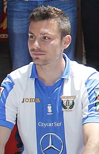 Felicidades pepineros!! Vuestro ascenso a Primera es la historia de un sueño, el resultado de vuestro trabajo y esfuerzo. Sois un orgullo para todo Madrid! Enhorabuena CD Leganés. #LeganésEsDePrimera